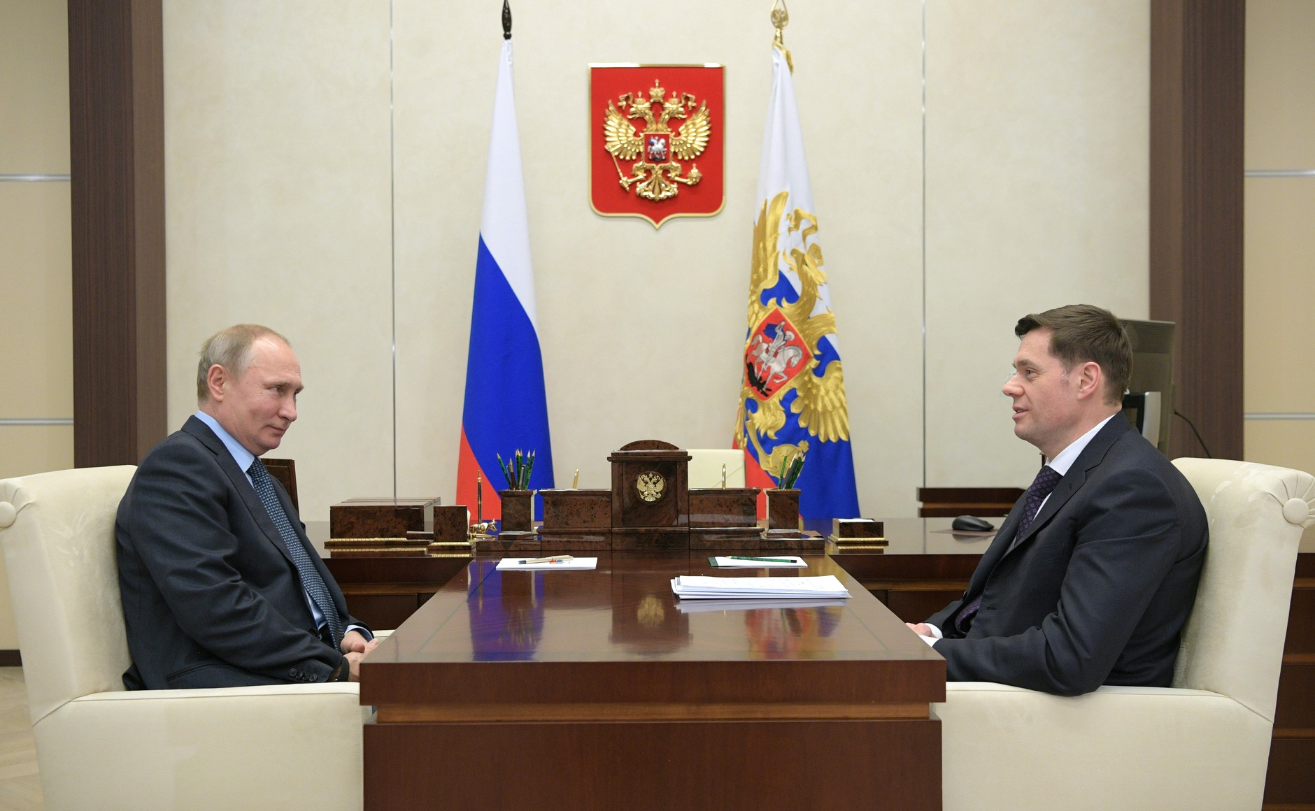 Встреча Президента России Владимира Путина с председателем совета директоров ПАО «Северсталь» Алексеем Мордашовым